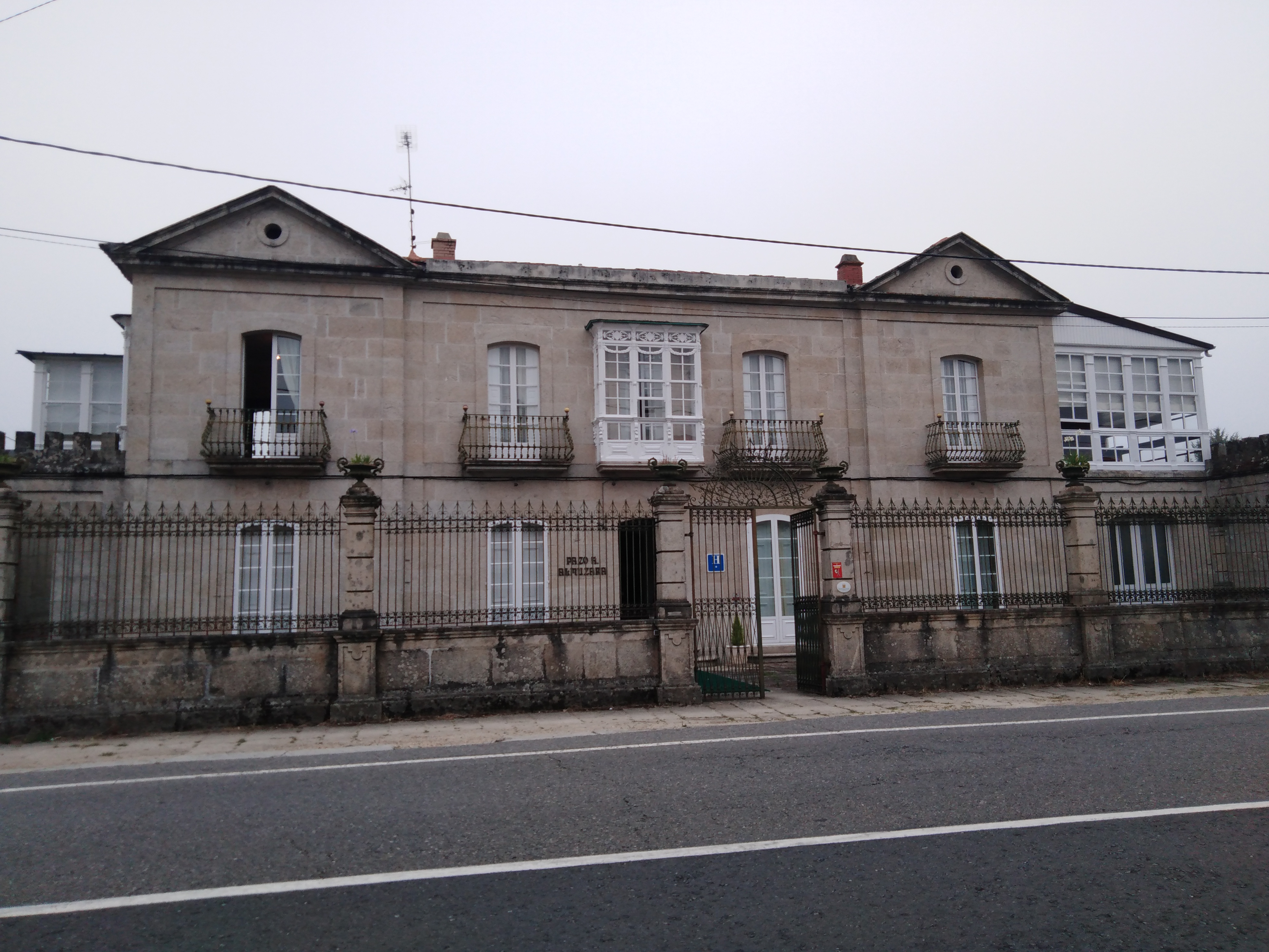 Pazo da Almuzara ao pé da estrada N-541 (Xuvencos, Boborás)